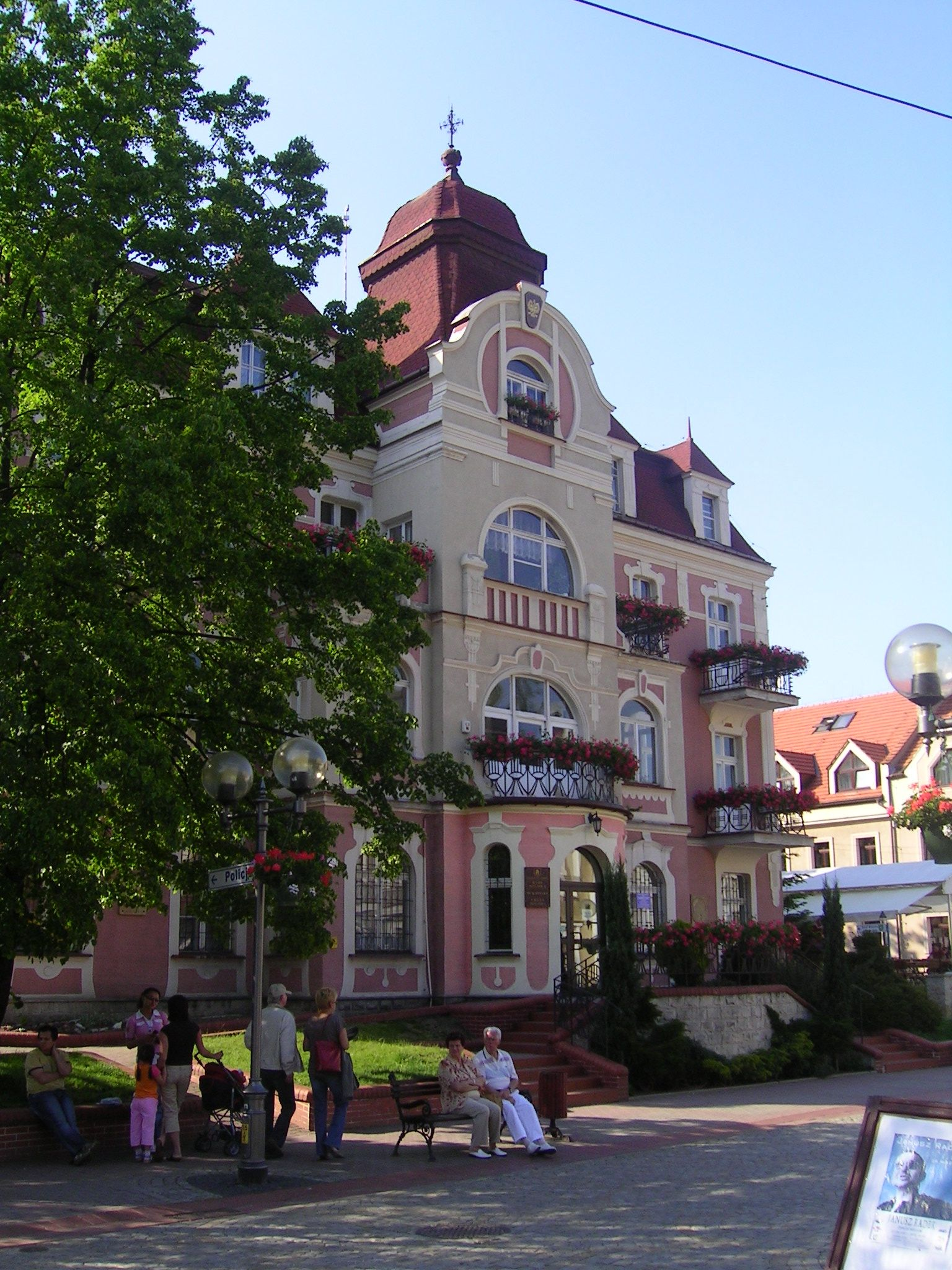 Szczawno-Zdrój, ul. Kościuszki 17 - budynek UM